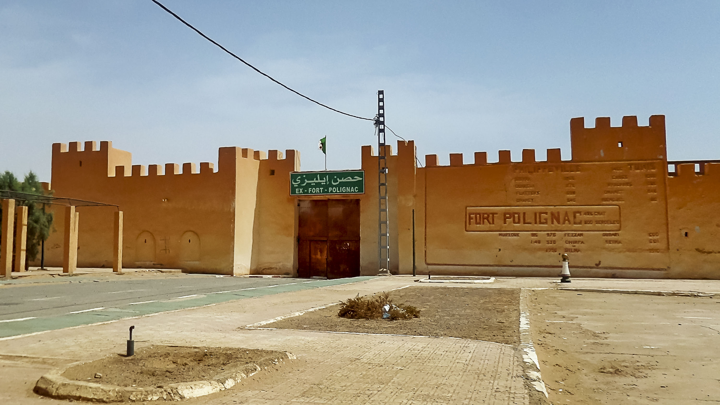 Fort Polignac حصن اليزي